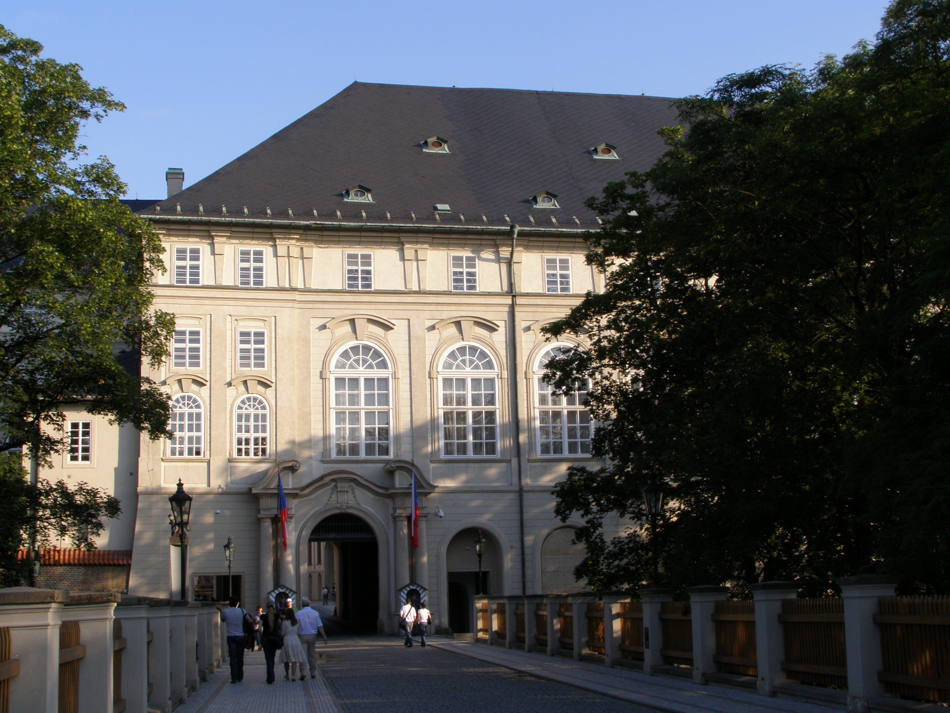 Praha, Hradčany, Hrad, Prašný most